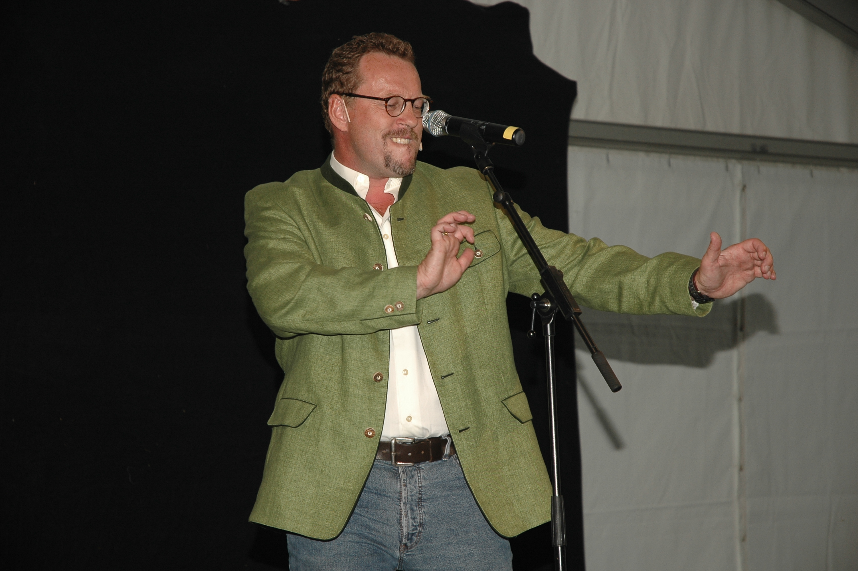 Herbert Steinböck während eines Auftrittes in Angern am 31. August 2007